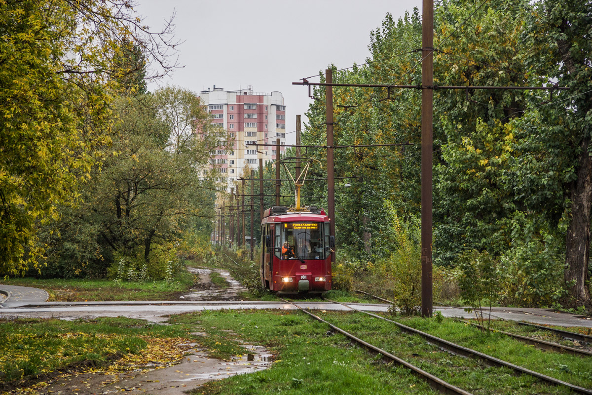 Трамвай АКСМ-62103 в кустах, Казань